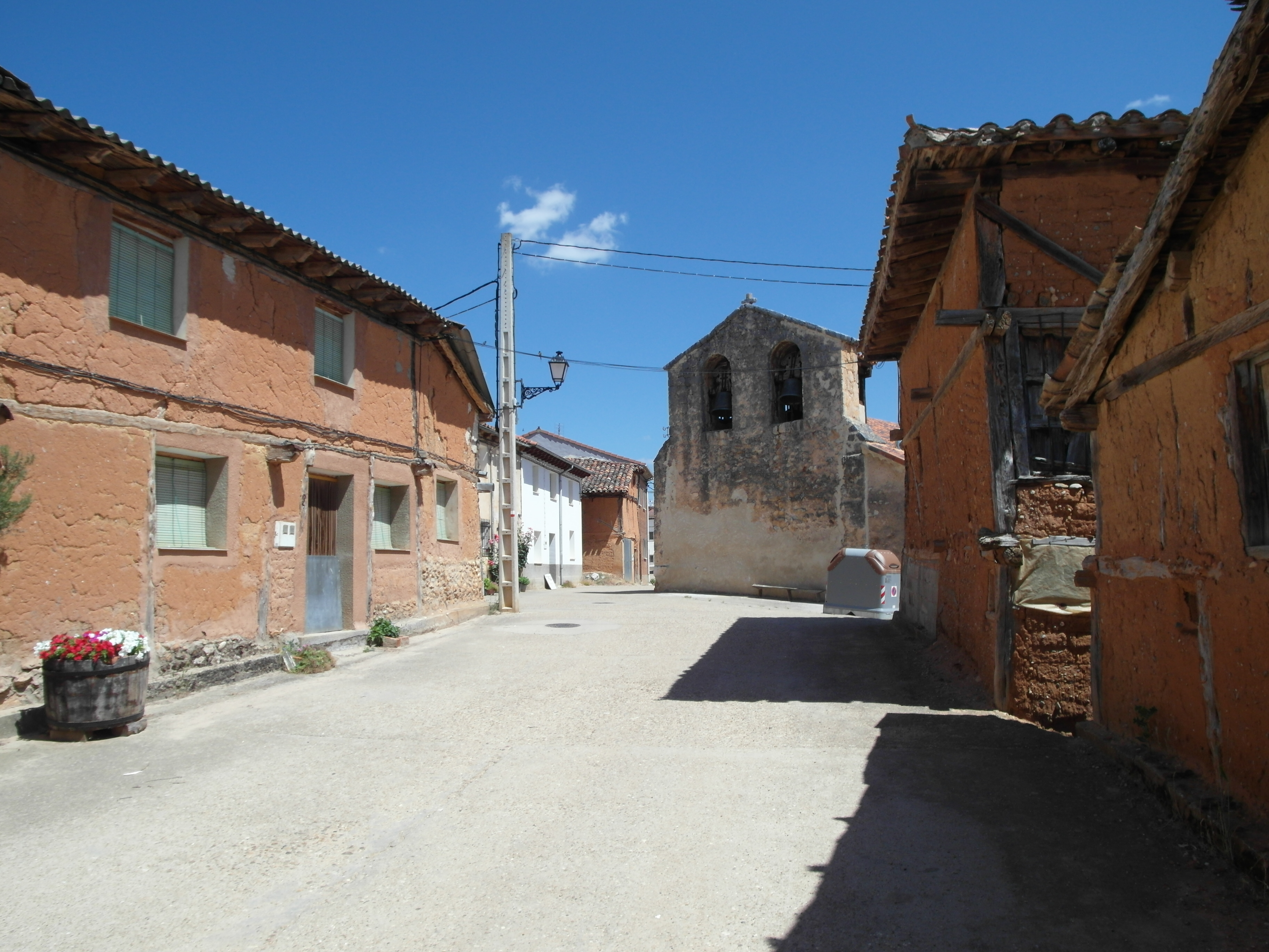 Sotos del Burgo, Soria.